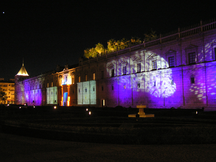 Fachada del Hospital de las Cinco Llagas, sede del Parlamento de Andalucía, alumbrado en 2007, durante la celebración de su 25º aniversario